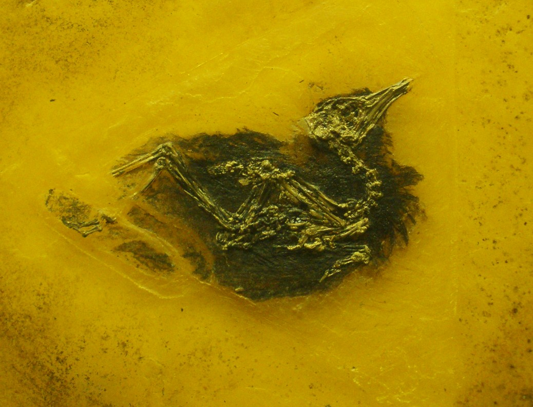 Fossil of Primozygodactylus, an extinct bird- Took the photo at Senckenberg Museum of Frankfurt